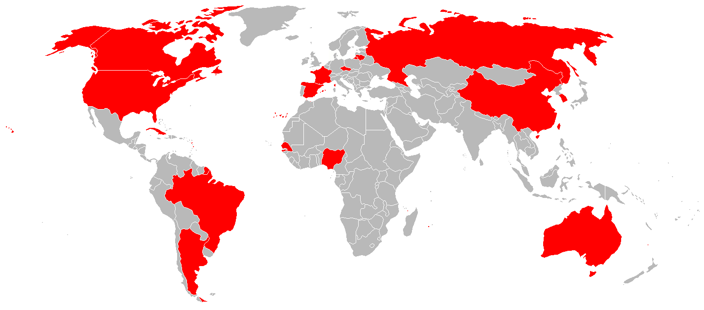 Mapa de los Países Participantes